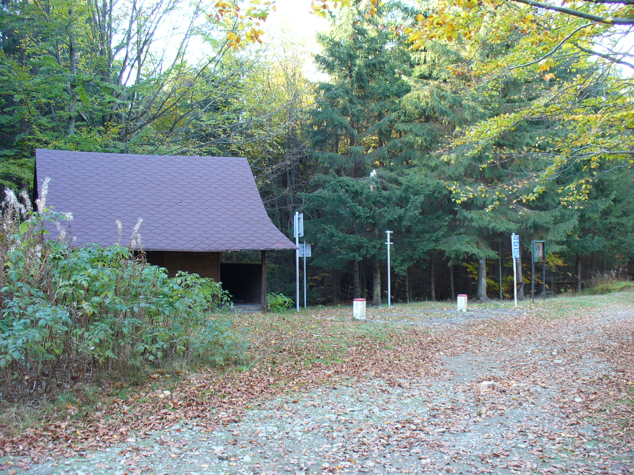 Przełecz Beskidek - przejście małego ruchu granicznego